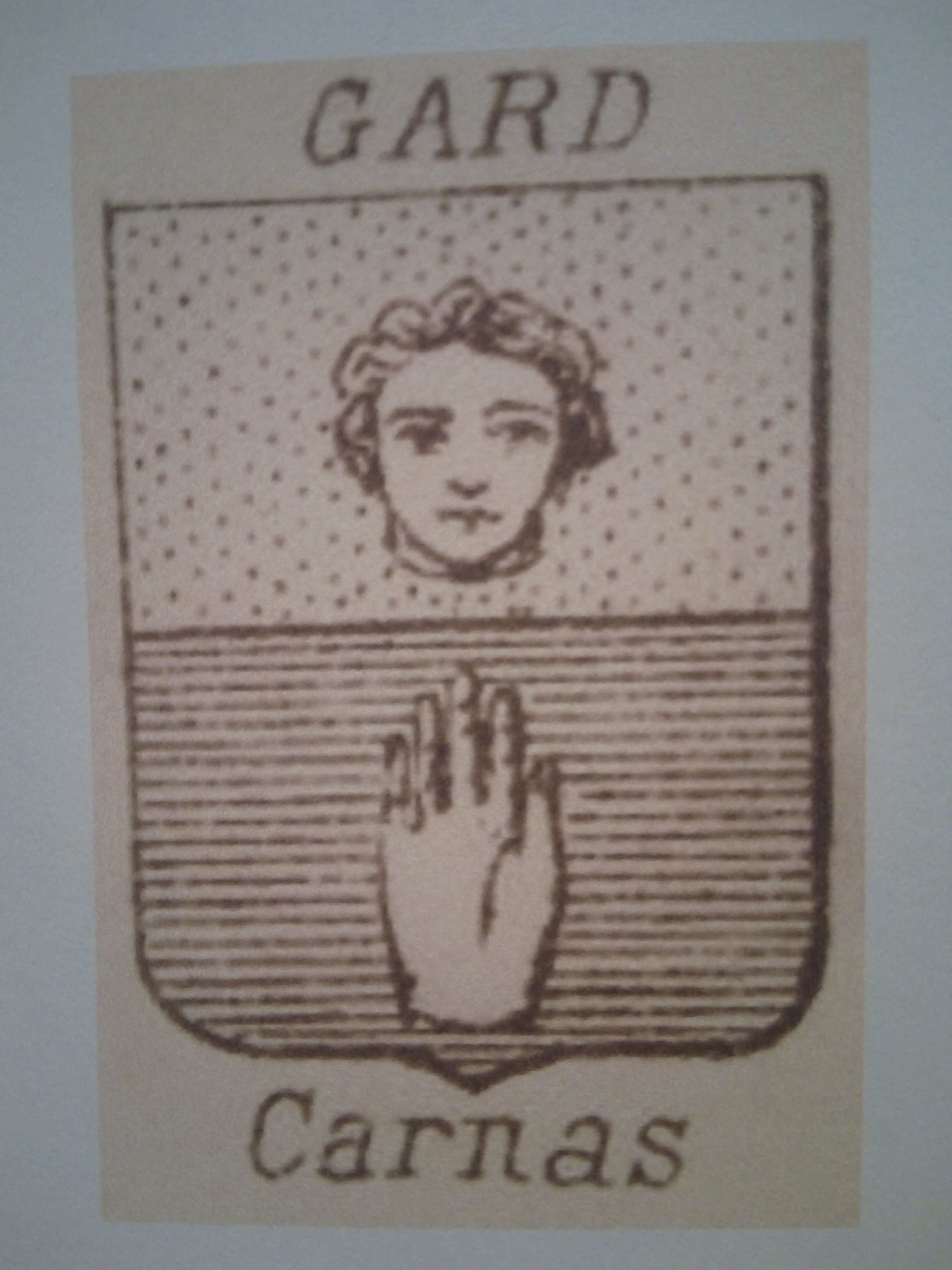 Blason original issu d'une collection de 1865.